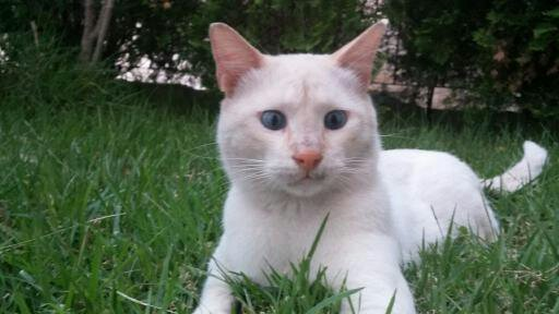 קצר שער בן שנה.